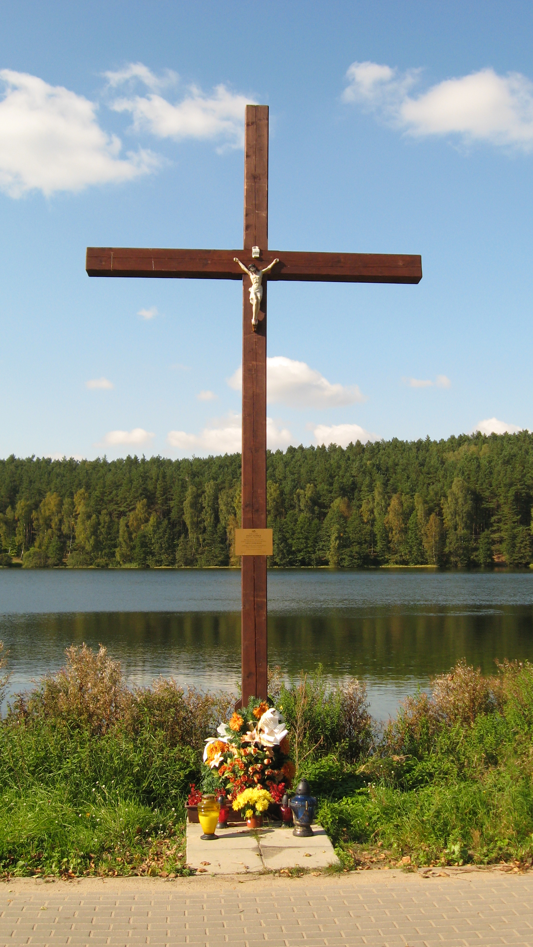 Krzyż upamiętniający porucznika Józefa Dambka / Gryf Pomorski / położenie Jezioro Dąbrowskie